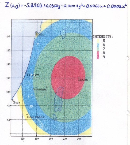 מפת פני שטח מגמתיים